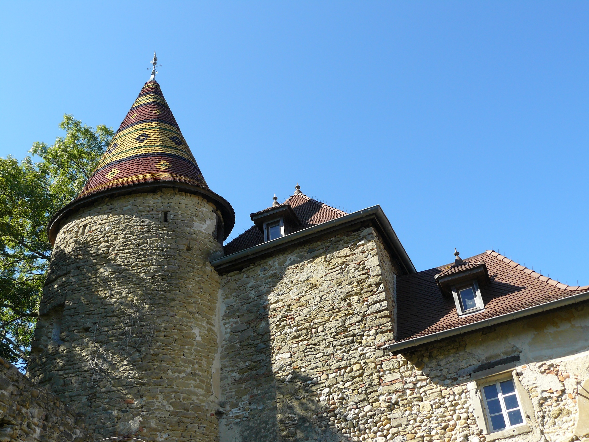 Tour avec tuiles dauphinoises du château de Vallin (St-Victor-de-Cessieu en Isère)